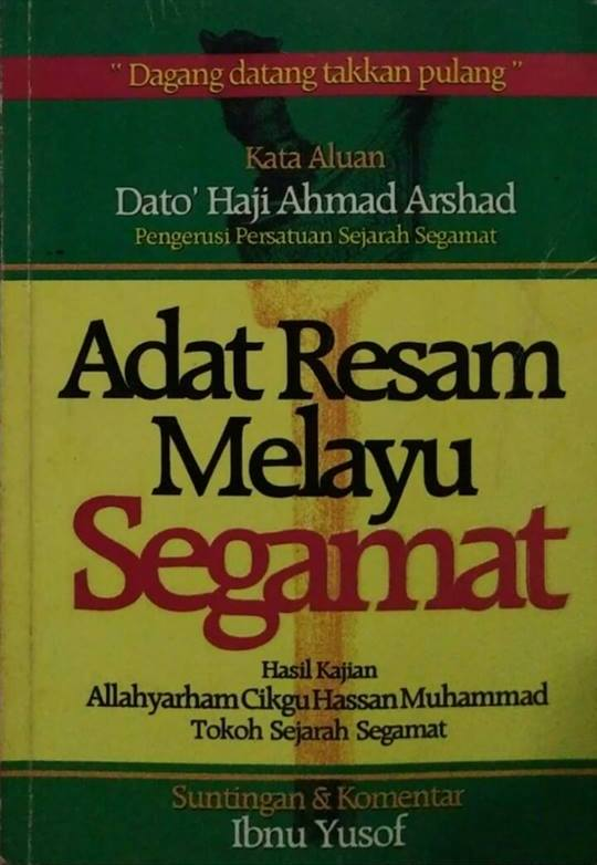 Adat Resam Melayu Segamat